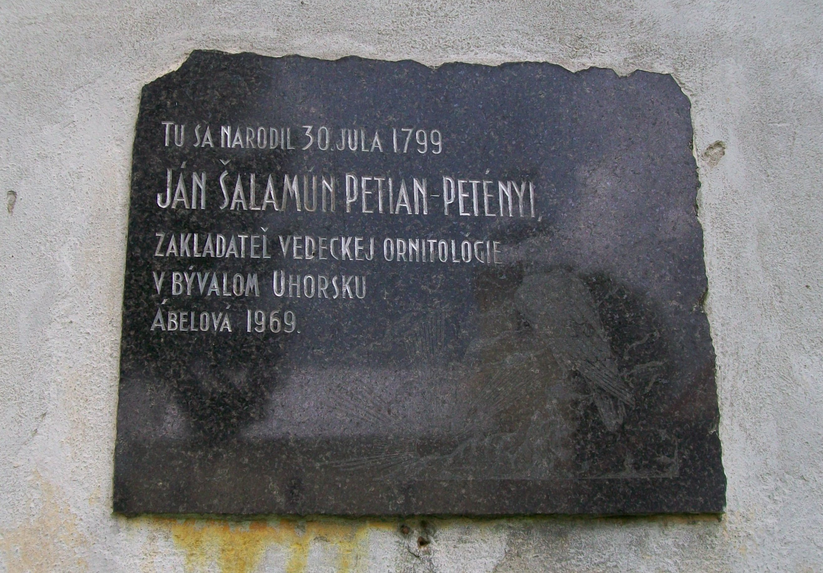 Pamätná tabuľa ábelovského rodáka Jána Šalamúna Petiana-Petényiho (1799-1855), ktorý bol zoológom. Pôsobil ako evanjelický farár v slovenskej obci Činkota pri Pešti.